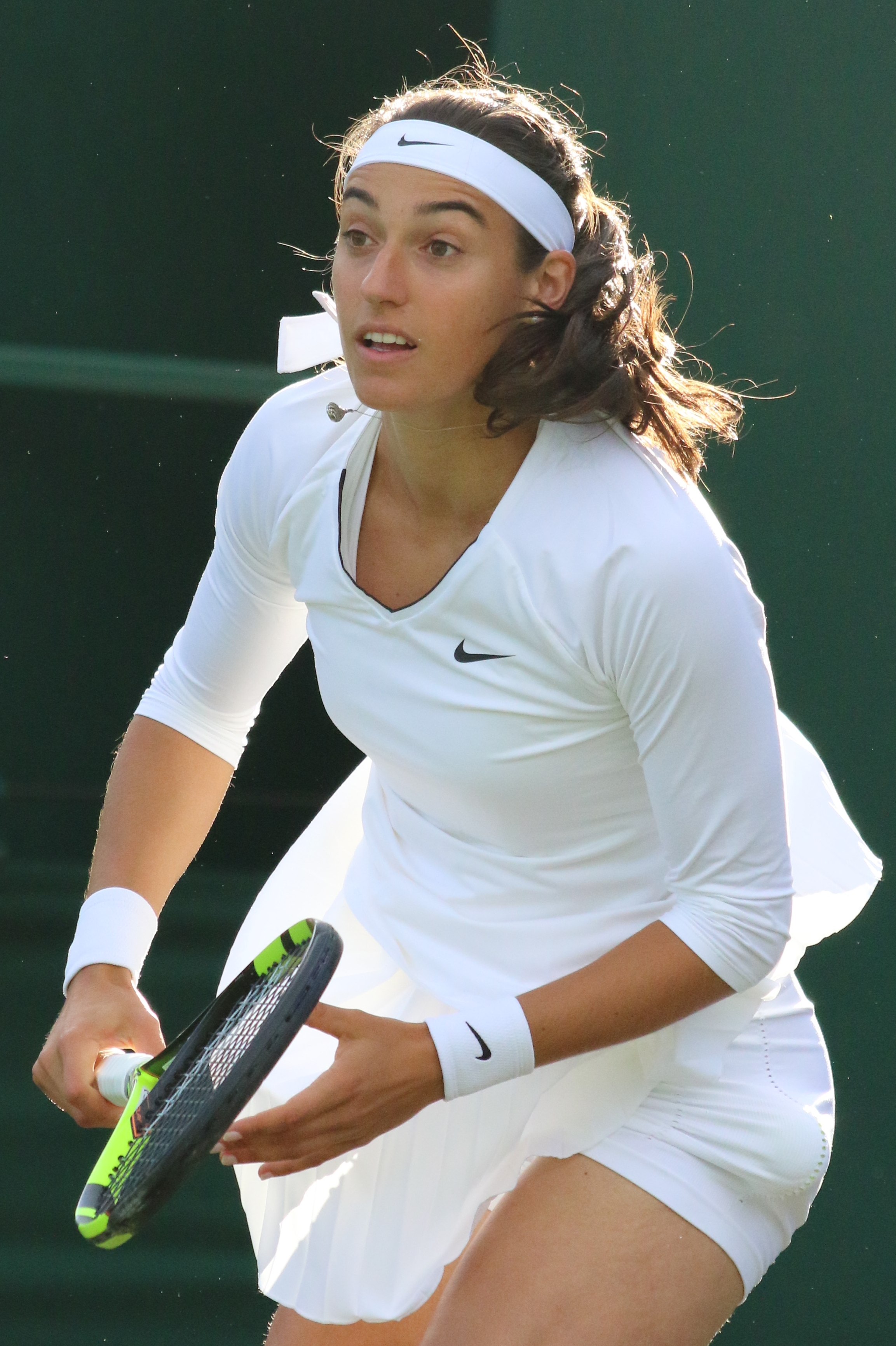 Garcia WM16 (1)